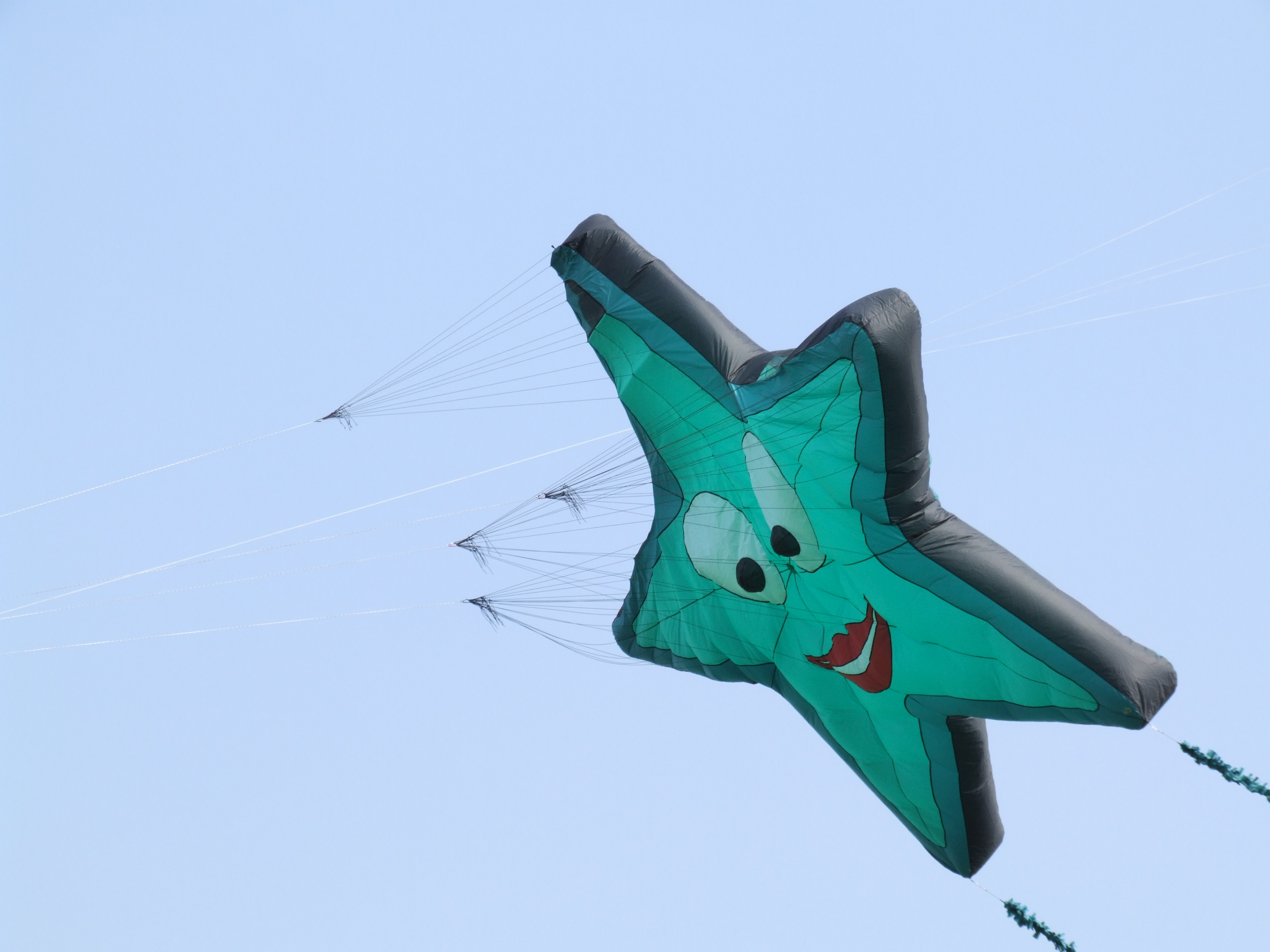 Drachen in Sternform, über einer Wiese südlich von Hockenheim